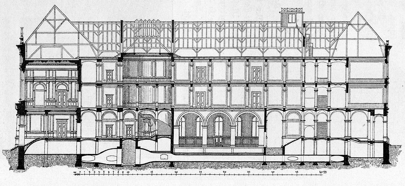 1877-1908 - Schnittzeichnung mit Turnschule der Realschule des Johanneums - heute: Museum für Kunst und Gewerbe Hamburg